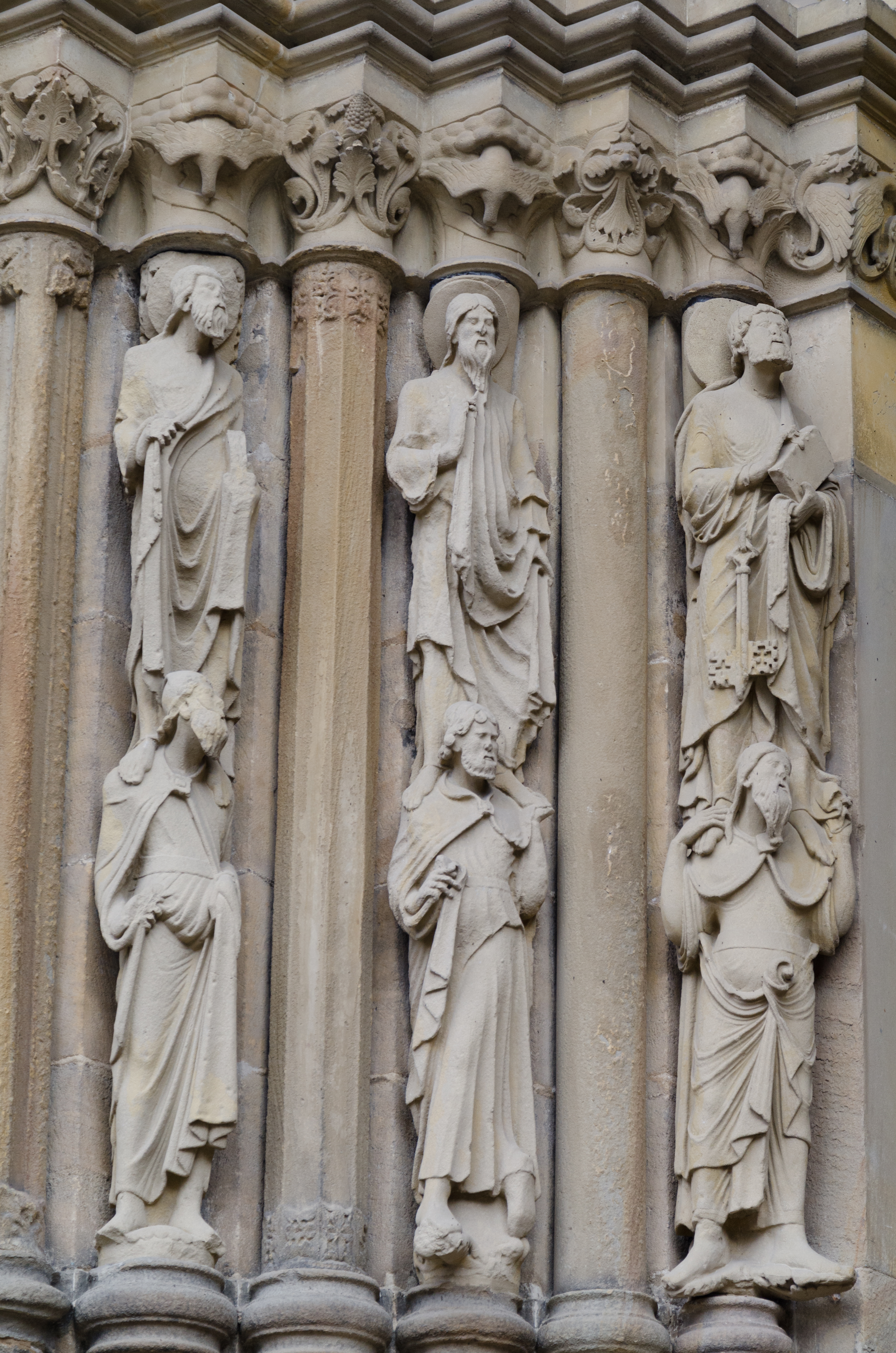 Bamberg, Dom, Fürstenportal, Propheten und Apostel